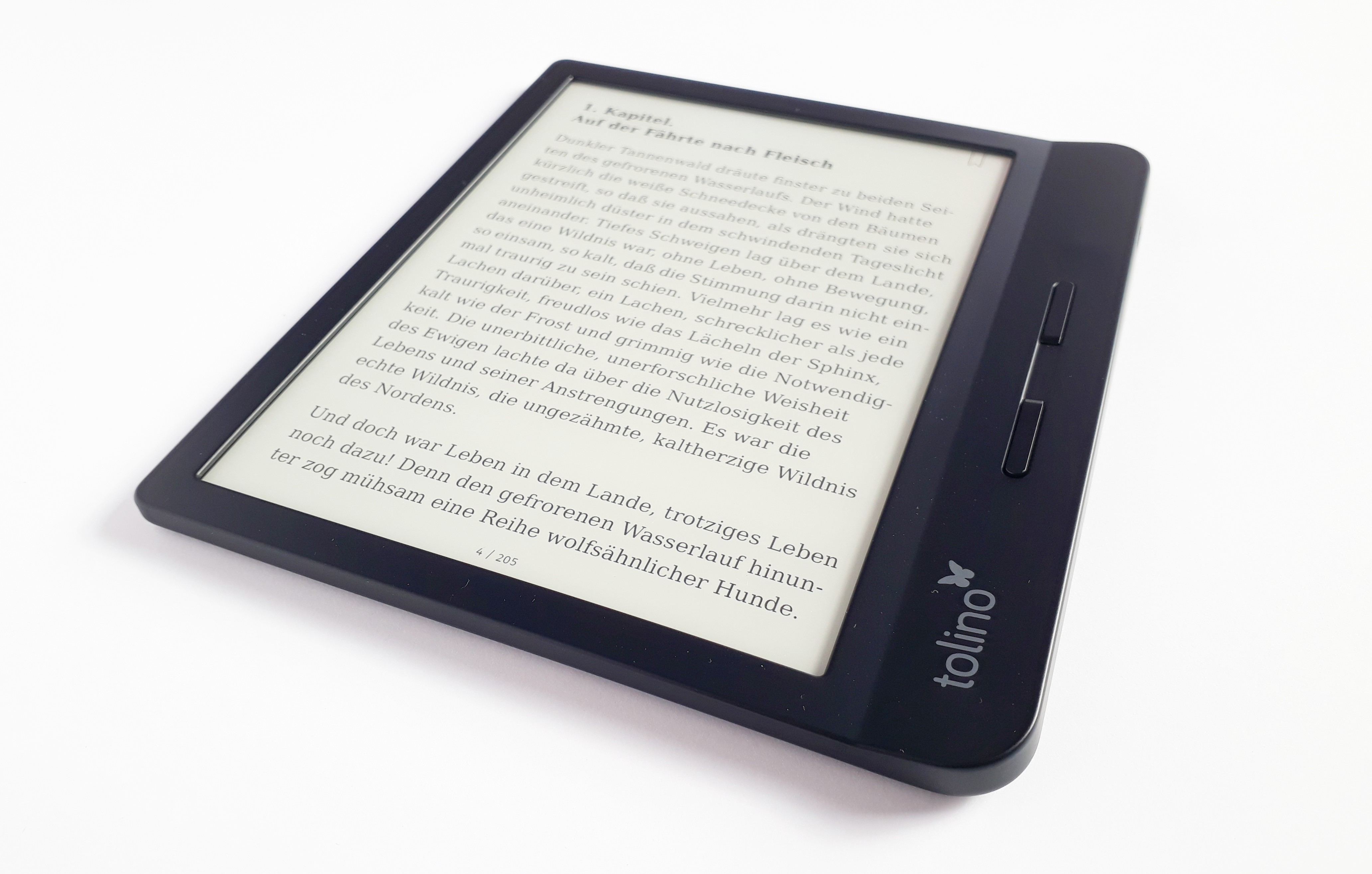 Tolino Vision 5 - Frontansicht mit Verpackung